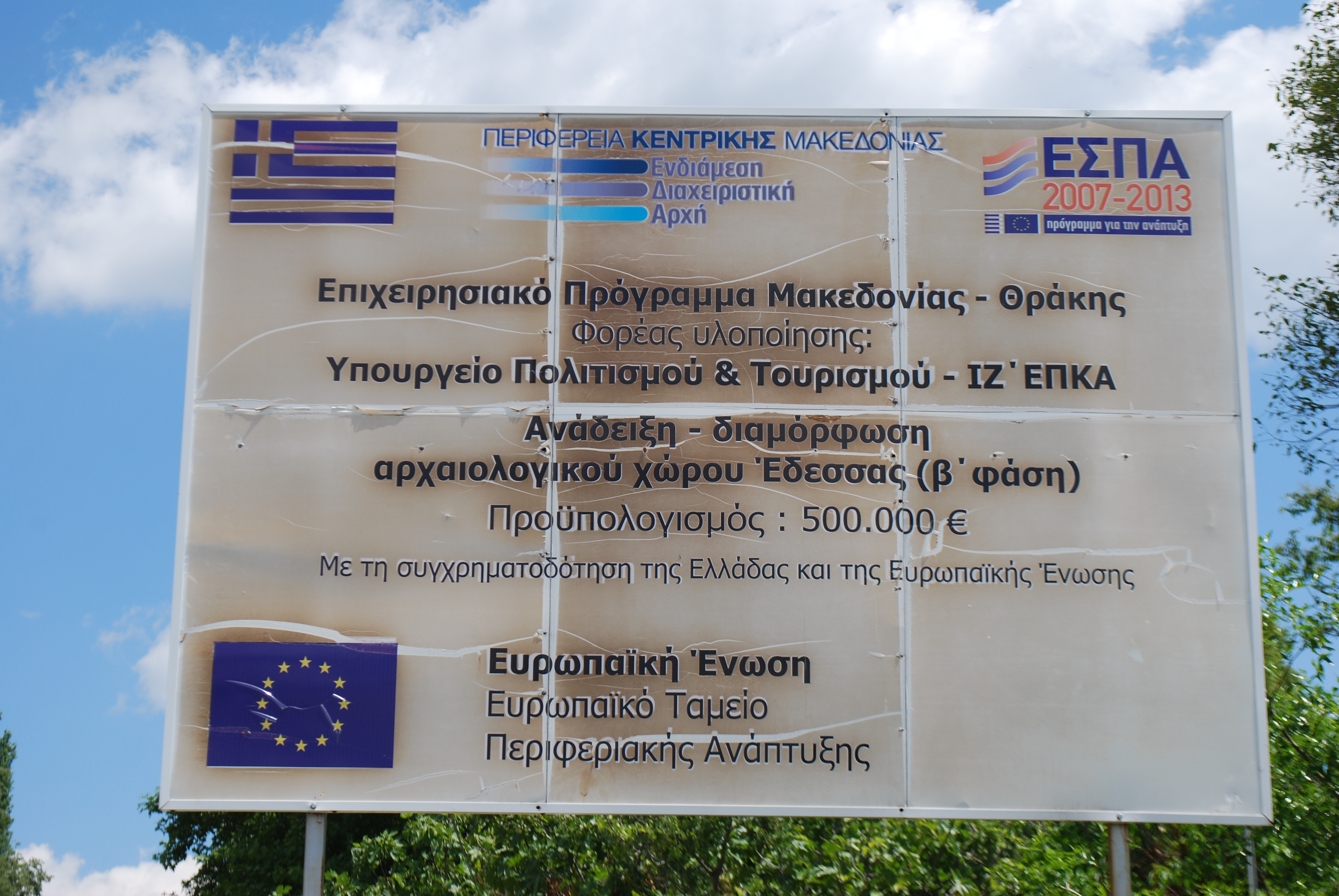 Vue du site archéologique de l'ancienne Edessa, en Macédoine (Grèce).